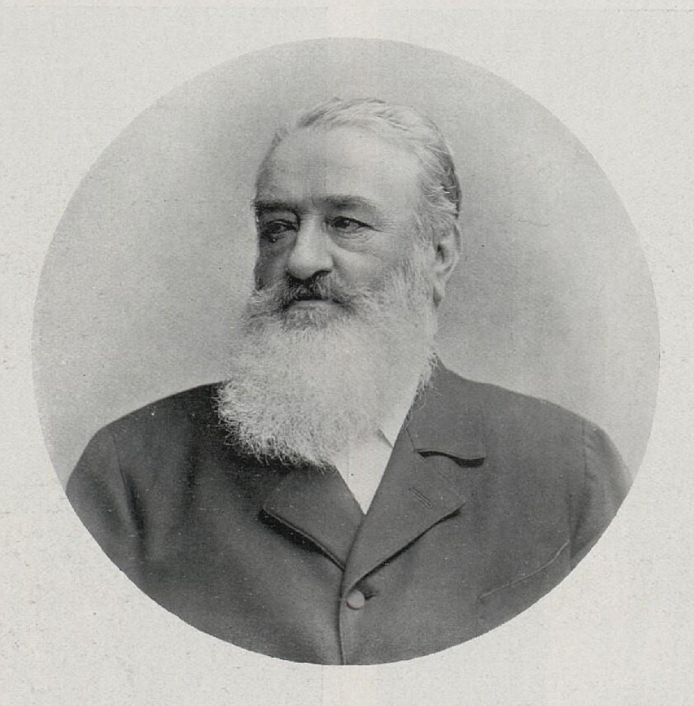 Julius Lippert (1839-1909), rakouský a český historik a politik